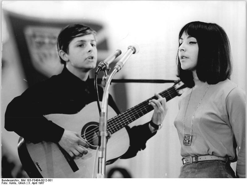 Zentralbild Kohls 4.4.1967 Vorbereitung zum VII. Parteitag der SED Berlin: Lyrikabend in der Berliner Kongreßhalle Nora Löhr (20) Redaktionsassistentin im Verlag Volk und Wissen und Wolfgang Gregor (18) Werkzeugmacher aus dem Funkwerk Köpenick bei ihrer Darbietung. Die besten von etwa 500 in den vergangenen drei Jahren eingereichten Gedichten eines Schülerwettbewerbes sind am Montagabend auf einer festlichen Veranstaltung zu Ehren des VII. Parteitages der SED vorgetragen worden. 1000 junge Teilnehmer nahmen die dargebotenene Beiträge begeistert auf. Mit viel Spaß wurden gemeinsam mit Mitgliedern des "Oktoberklubs" und des "Teams 4" alte und neue Liedern gesungen.